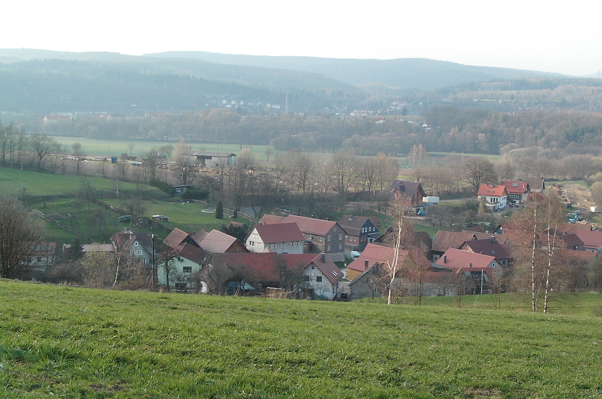 Blick vom Hohen Stieg auf Geisenhöhn; im Hintergrund Schleusingen